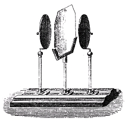 Gravure. Les deux armatures du condensateur son séparée par de l'air (diéléctrique), Les plaques métaliques peuvent être approchées et éloignées se qui permet de varier sa capacité et en faisait un outil de choix pour les étudiants du XIX et du début du XX.